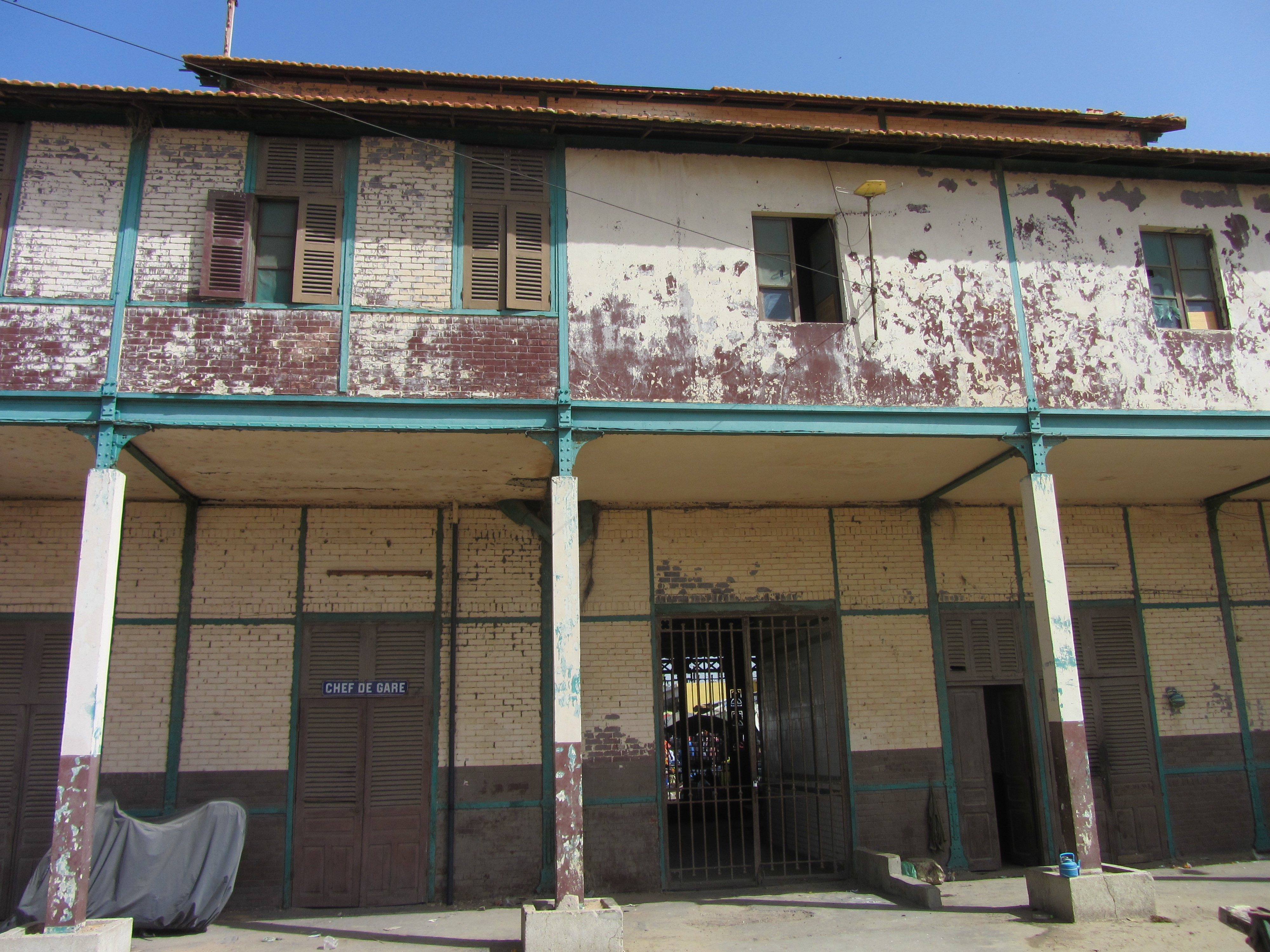 Gare de Saint-Louis, Sénégal This document was produced using the Canon PowerShot SX230 HS lent by Wikimedia France.